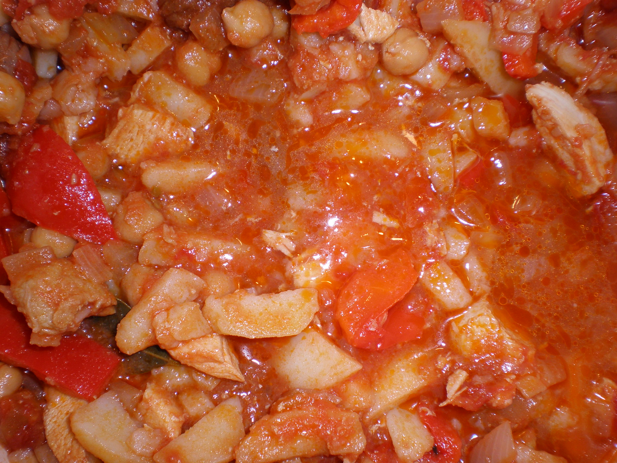 Filipino menudo